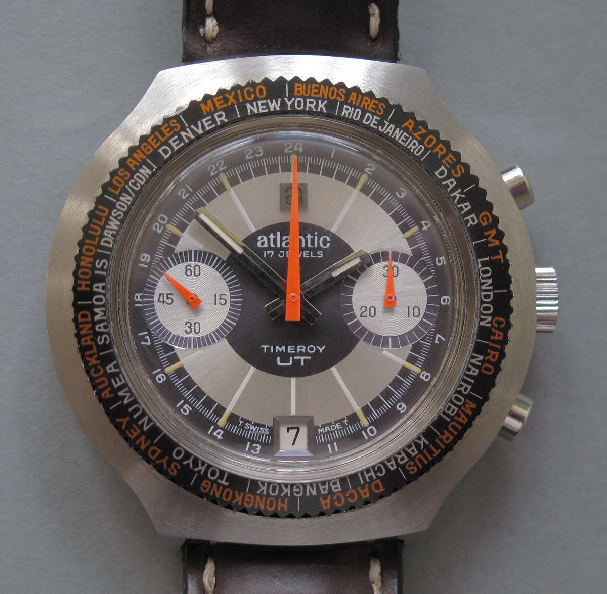 Vintage-Chronograph Modell Timeroy mit 24h-Weltzeit-Drehlünette